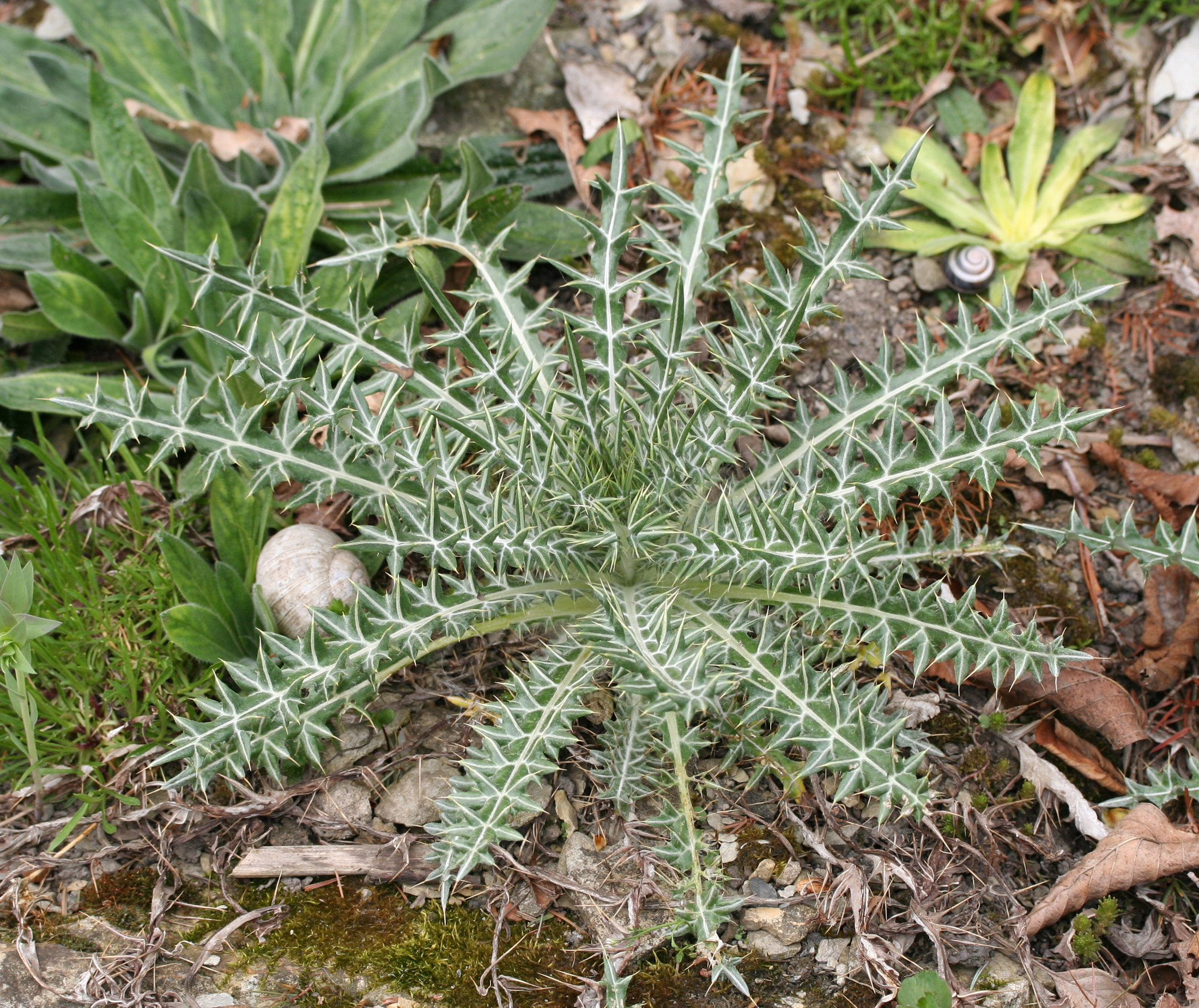 Ptilostemon afer im Botanischen Garten Dresden